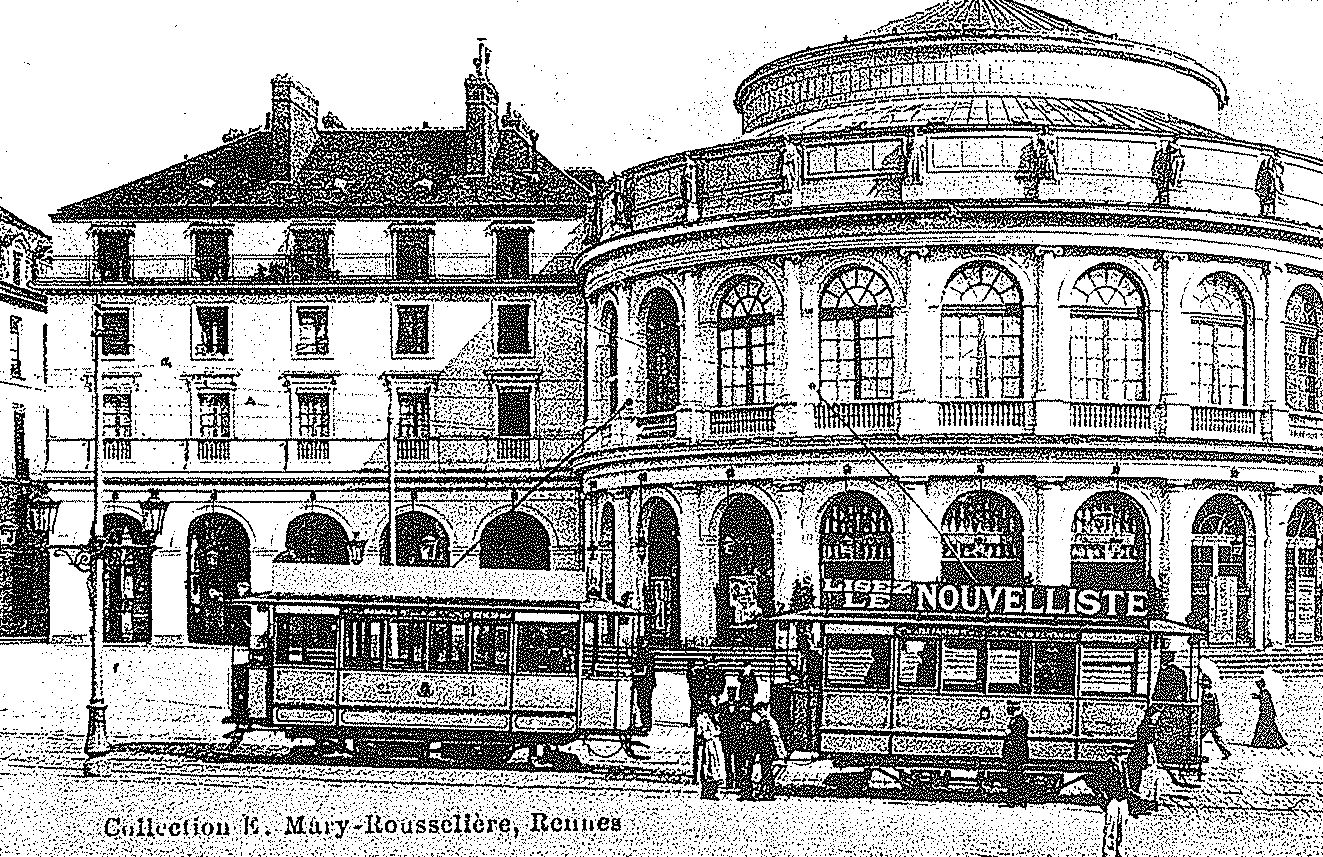 Carte postale de l'opéra de Rennes. Tramway de Rennes.